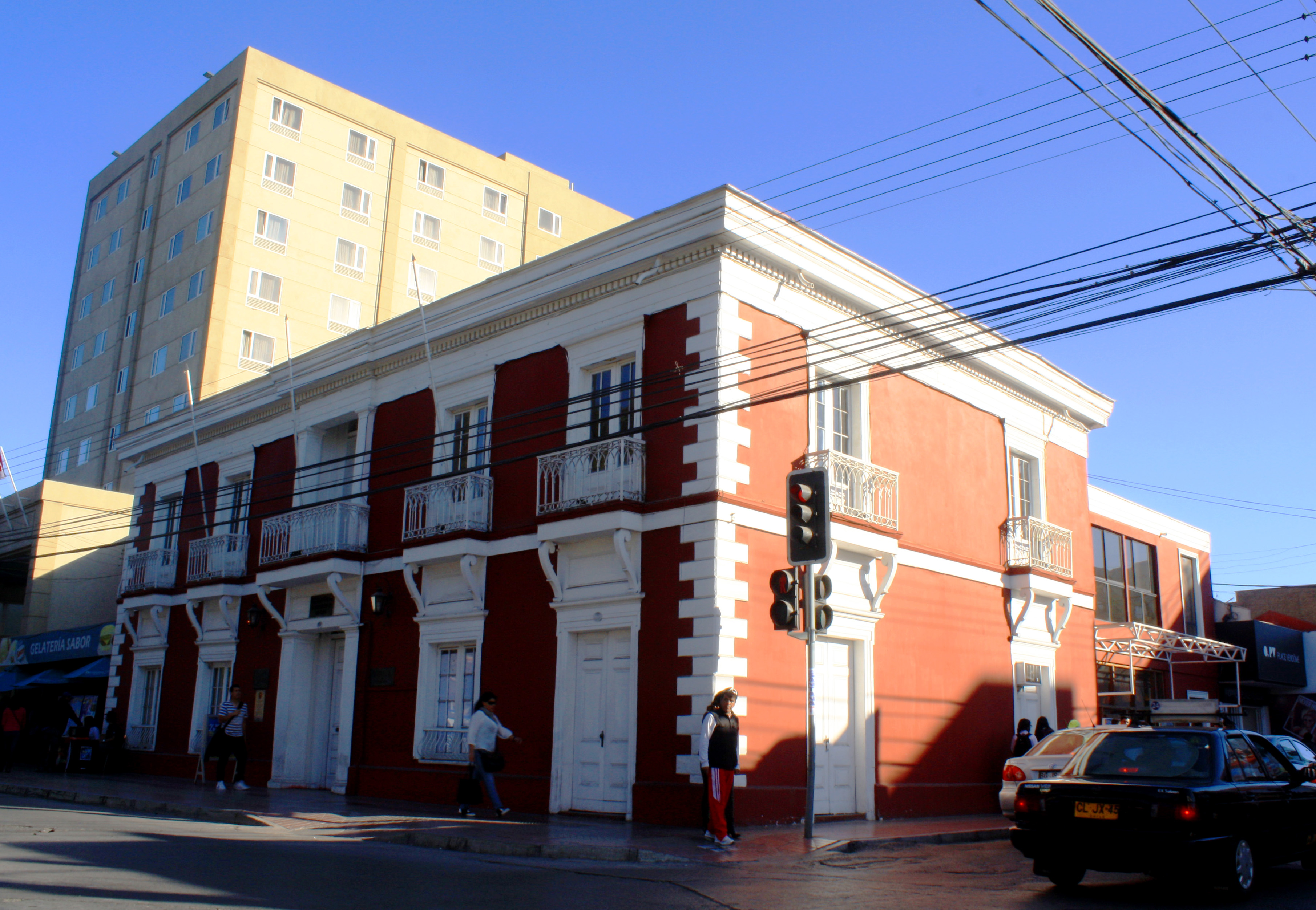 Mansión señorial del siglo XIX, cuya construcción data desde 1860, típica de la época de bonanza de la minería de la plata en Atacama. Antes de la construcción de este palacete, estuvo la casa que albergaba al Corregidor Francisco Cortes Cartabío y Roldan, fundador de la ciudad. Con el tiempo esta casa tuvo diversas utilidades, sirvió en el comercio, como hotel y farmacia, hasta que fue comprada a la Familia de don Nicolás Paulsen, por la Ilustre Municipalidad de Copiapó, para la administración comunal, en 1945. Desde 1996 está destinada a la Dirección de Extensión Cultural, (Casa de la Cultura) Su estructura no difiere de las distintas construcciones típicas de Copiapó, maderas, cañas, revestidas con barro. Su construcción neoclásica, con pilares de madera en su entrada principal, soportan una bella cornisa, al igual que sus cinco ventanas principales, con rejas de fierro forjado. Le rodea en su perímetro una cornisa de maderas, finamente adosada. This is a photo of a national monument in Chile: 330